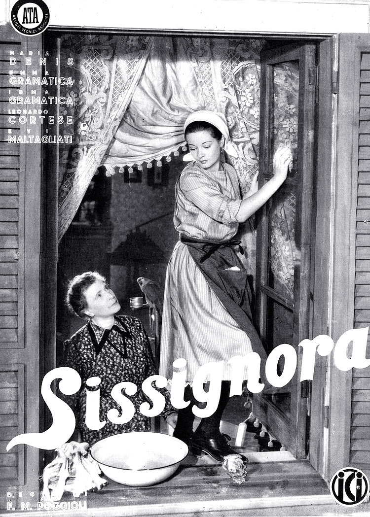 "Sissignora" (Poggioli, 1941) - immagine promoz